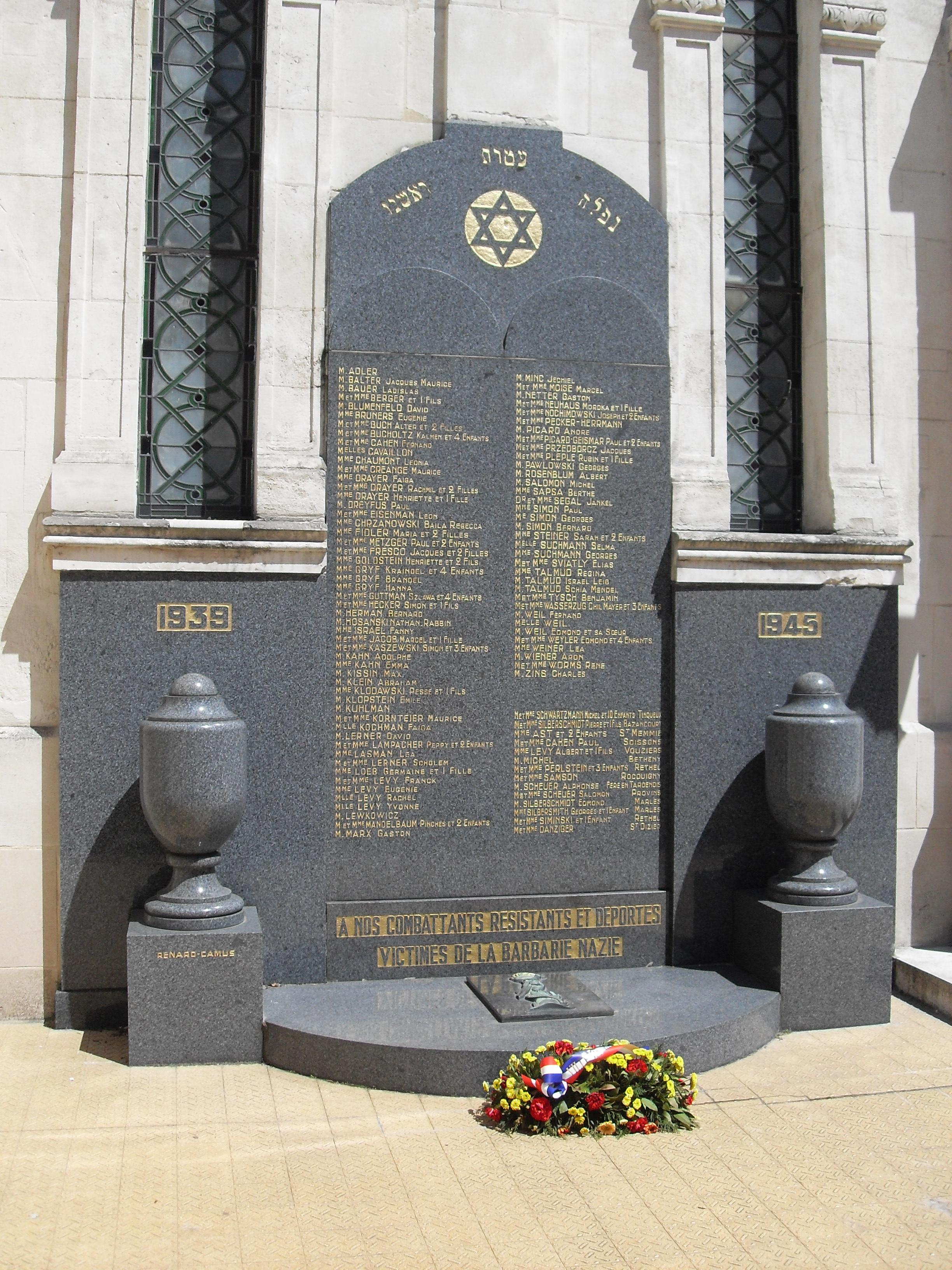 France, Reims, Marne (51) - Stèle devant la Synagogue de Reims en mémoire des déportés et des victimes de guerre, surmontée du verset biblique lamentations 5:16 en hébreu : נפלה עטרת ראשנו, "La couronne de notre tête est tombée". .